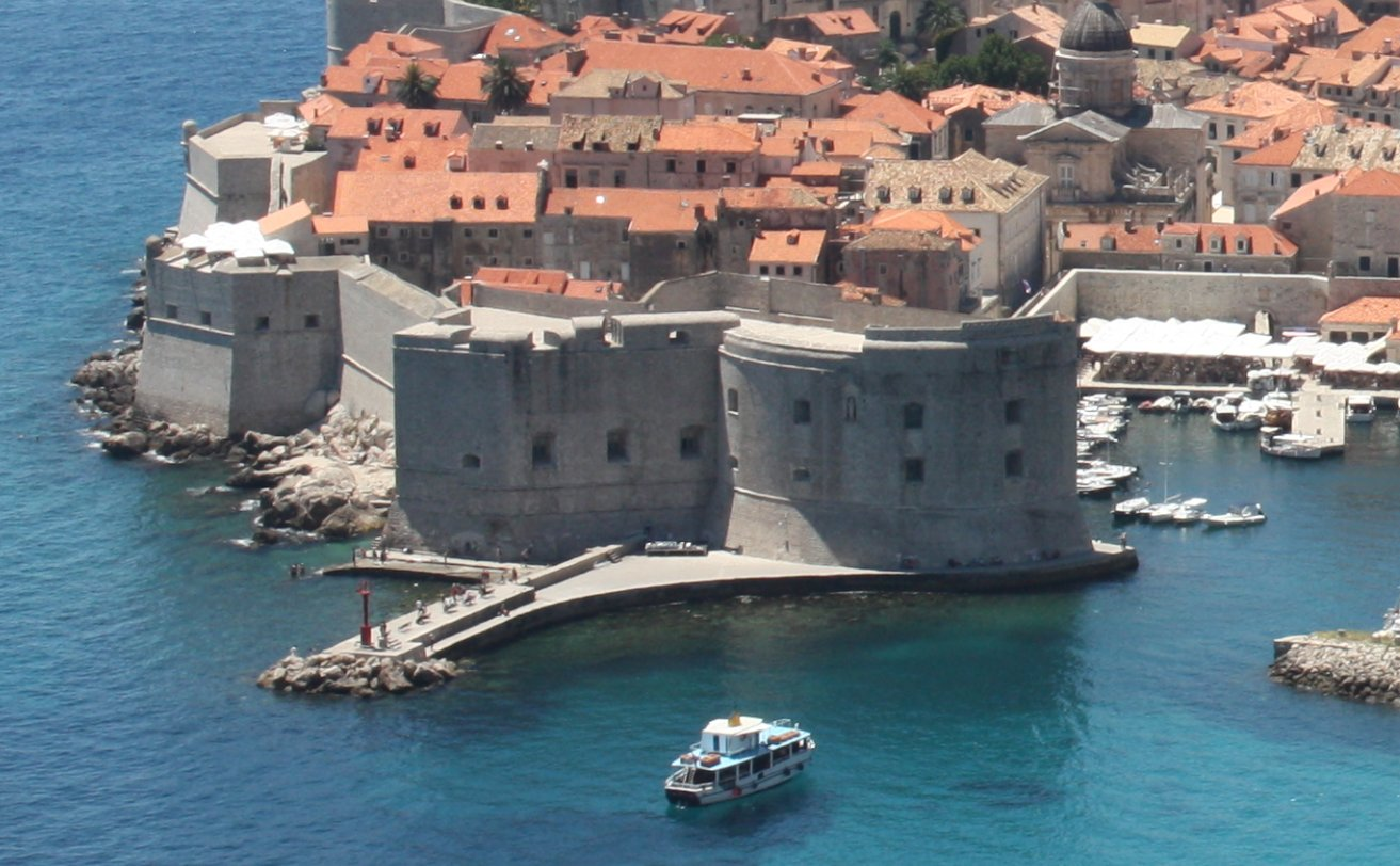 Lukobran Porporela